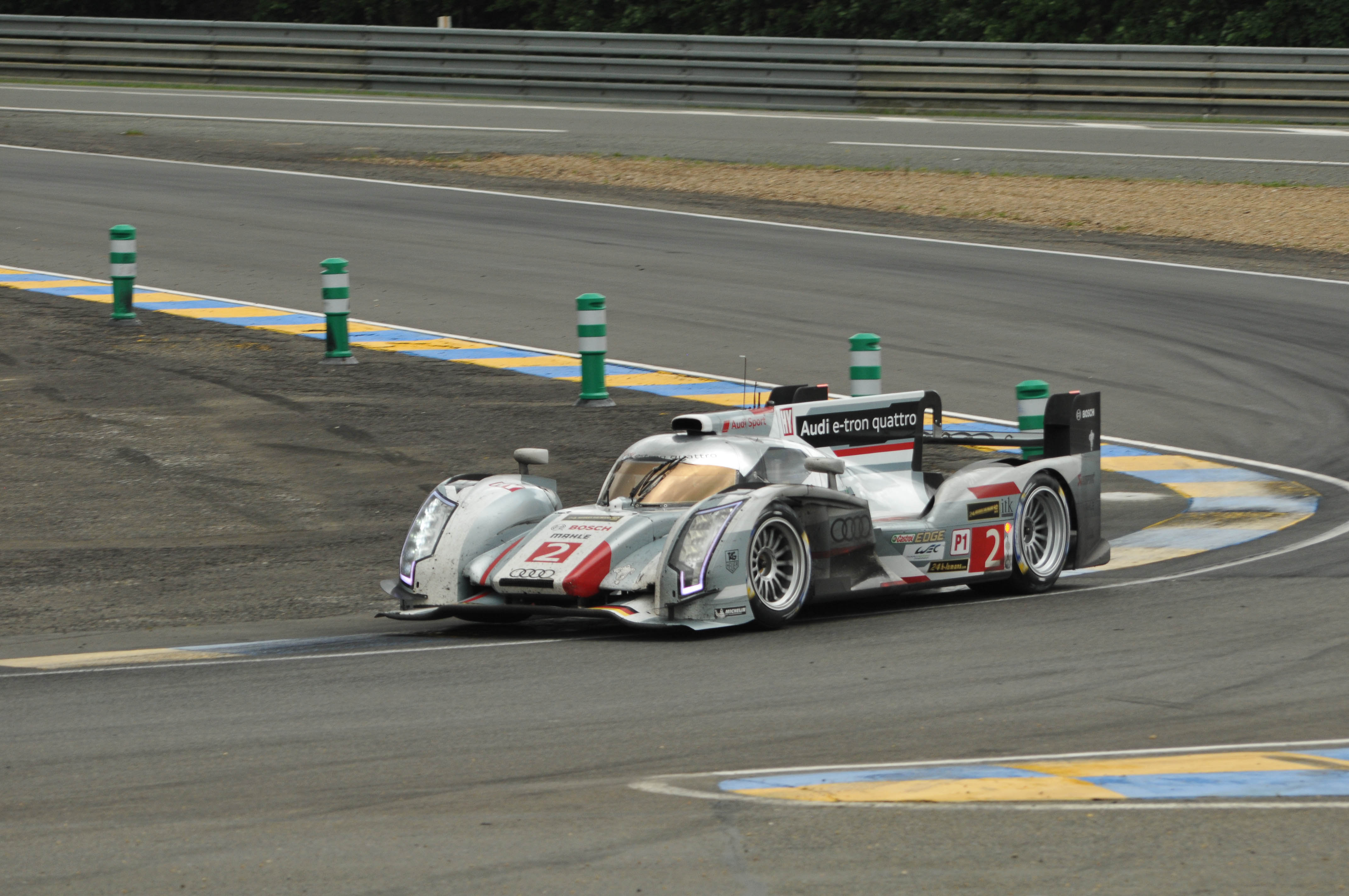 Le Mans 2013